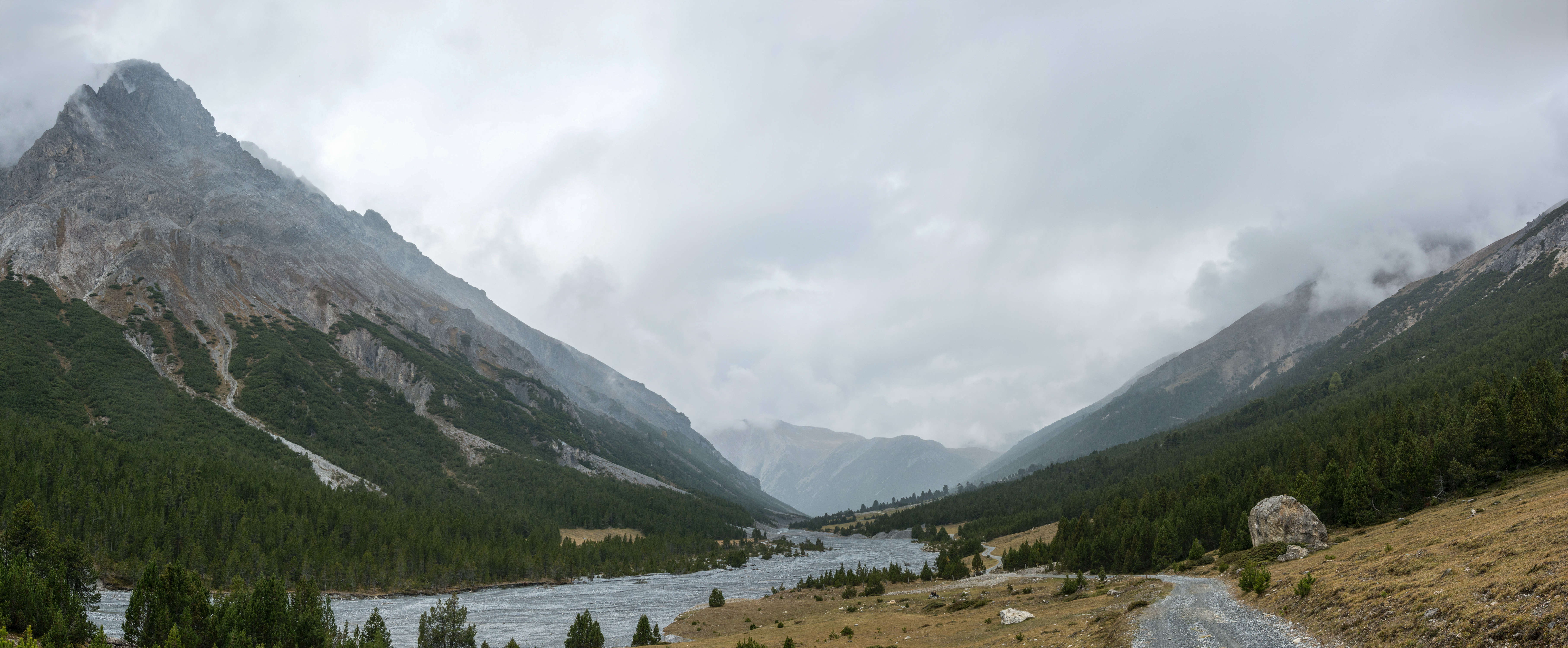 Biosfera Val Müstair - Val Mora, Alp Sprella, rechts der Piz Pala Gronda